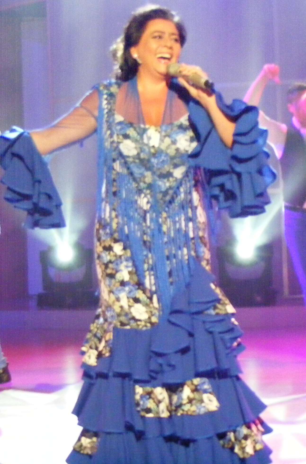 María del Monte cantante española en el 906º programa de Luar